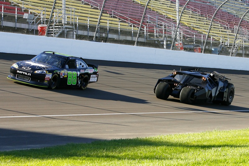 Dale Jr melawan mobil Batman di Michigan